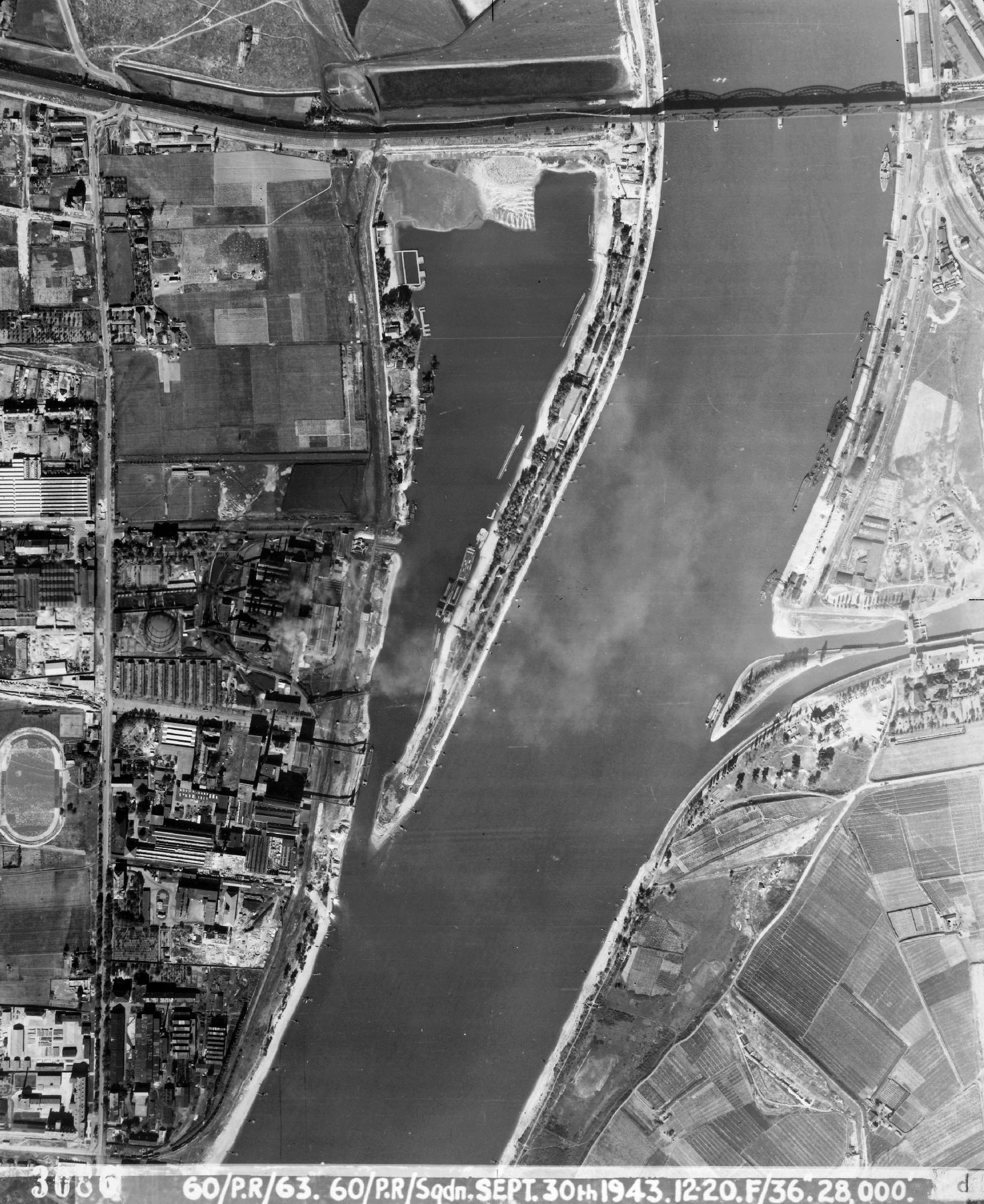 MAGYARORSZÁG BUDAPEST légifotó. Déli összekötő vasúti híd, Kopaszi gát, jobbra a Kvassay zsilip, baloldalt a Budapesti Kábelgyár sporttelepe